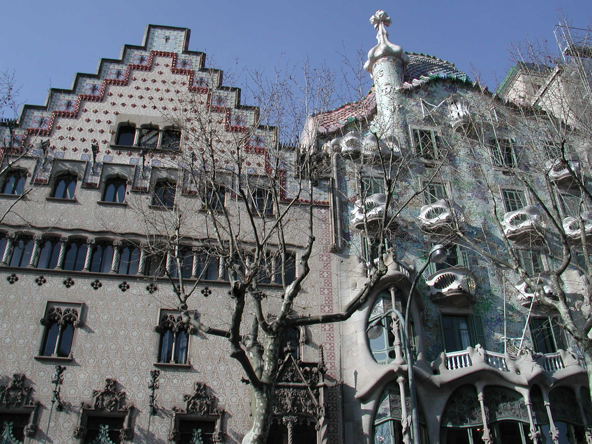 Casa Amatller (Puig i Cadafalch) and Casa Batlló (Antoni Gaudí i Cornet), Barcelona